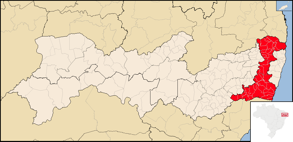 Localização da Mesorregião da Mata Pernambucana em Pernambuco.